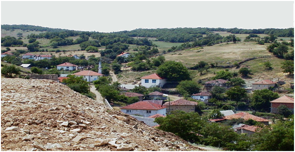 Shtepi te vjetra te fshatit Krivenik